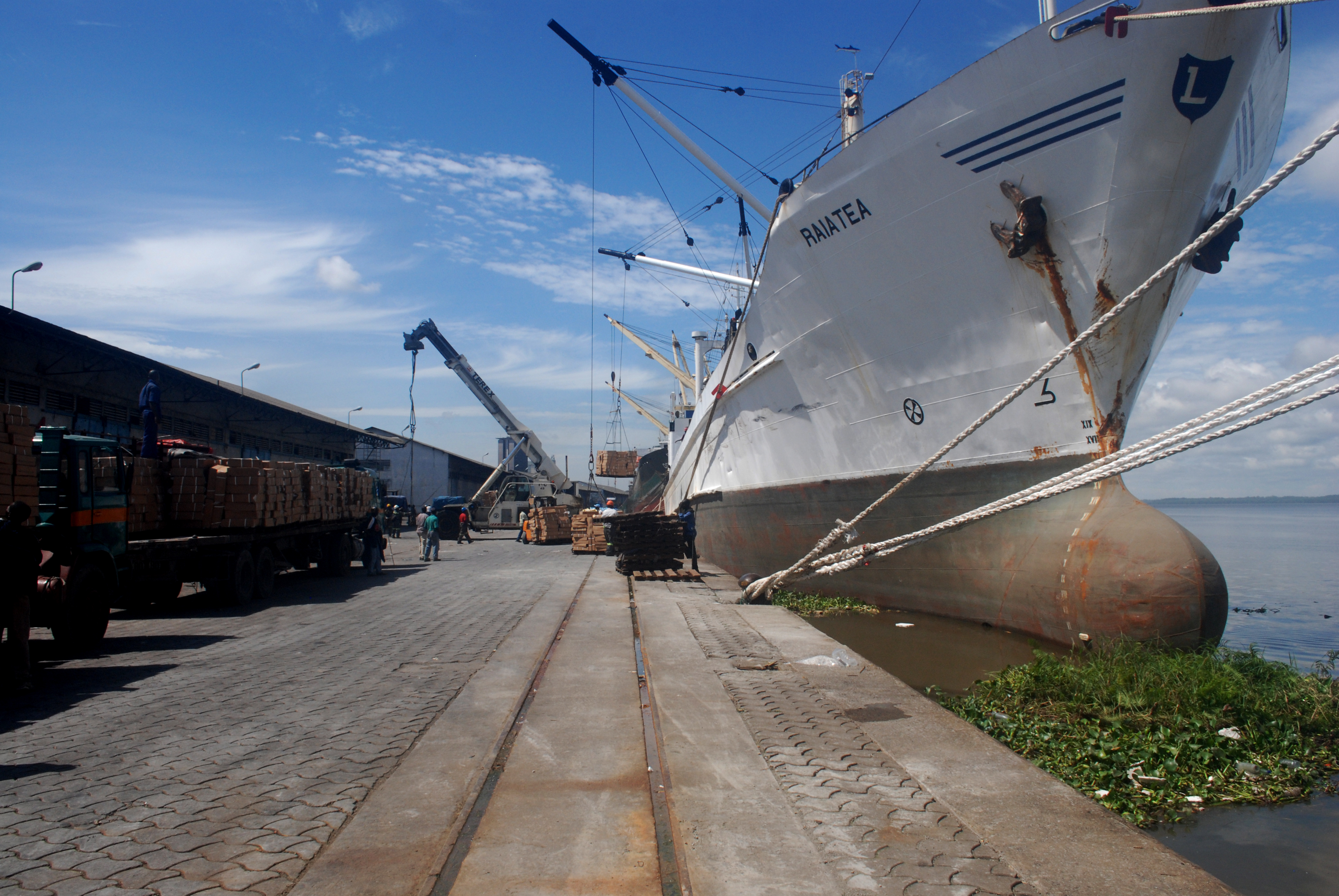 déchargement d’un navire au port de Douala au Cameroun This is an image with the theme "Africa on the Move or Transport" from: Cameroon